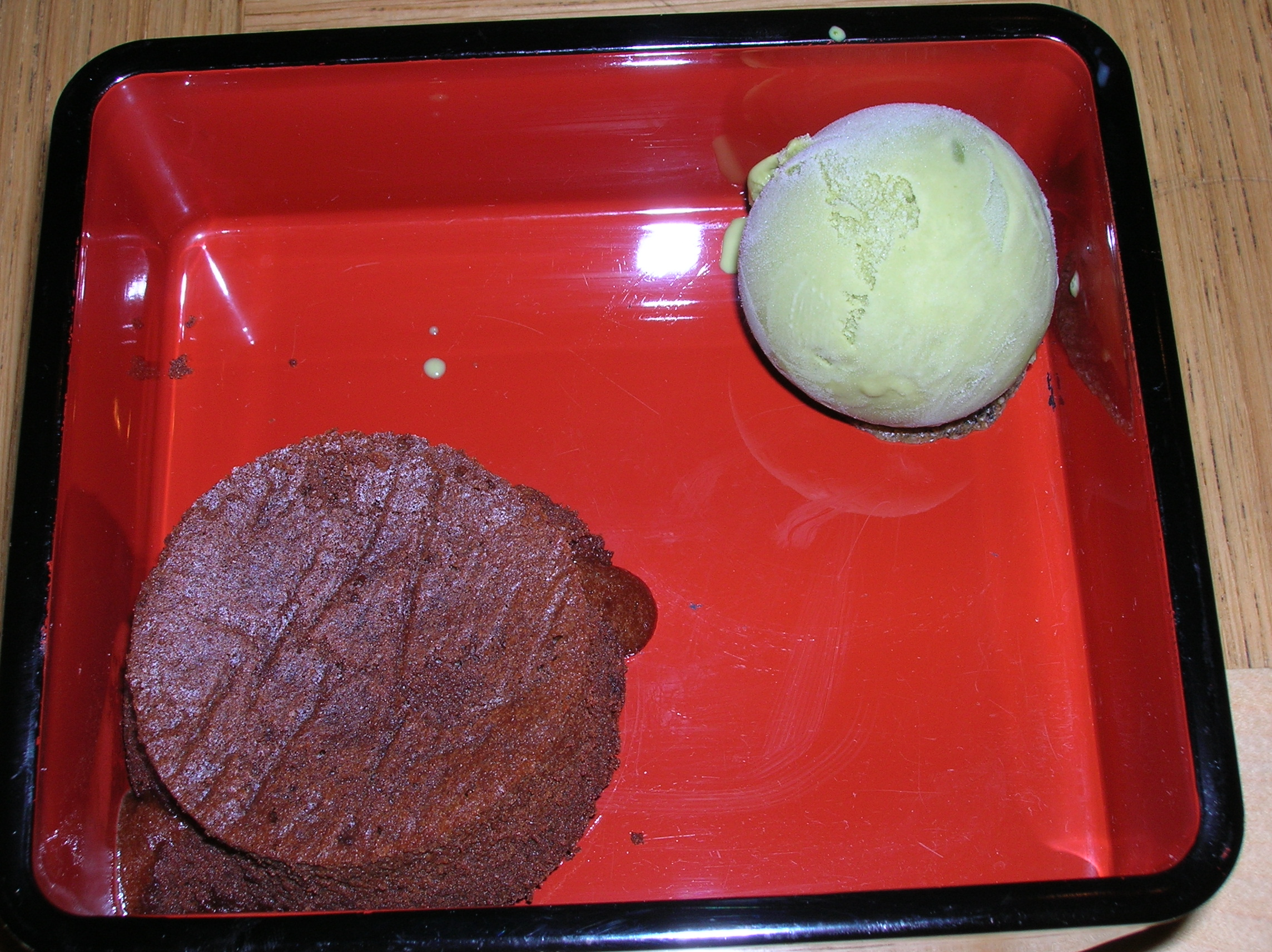 קופסת בנטו שוקולד